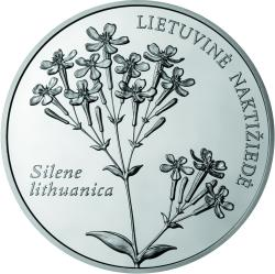 50 litų moneta, skirta Lietuvos gamtai